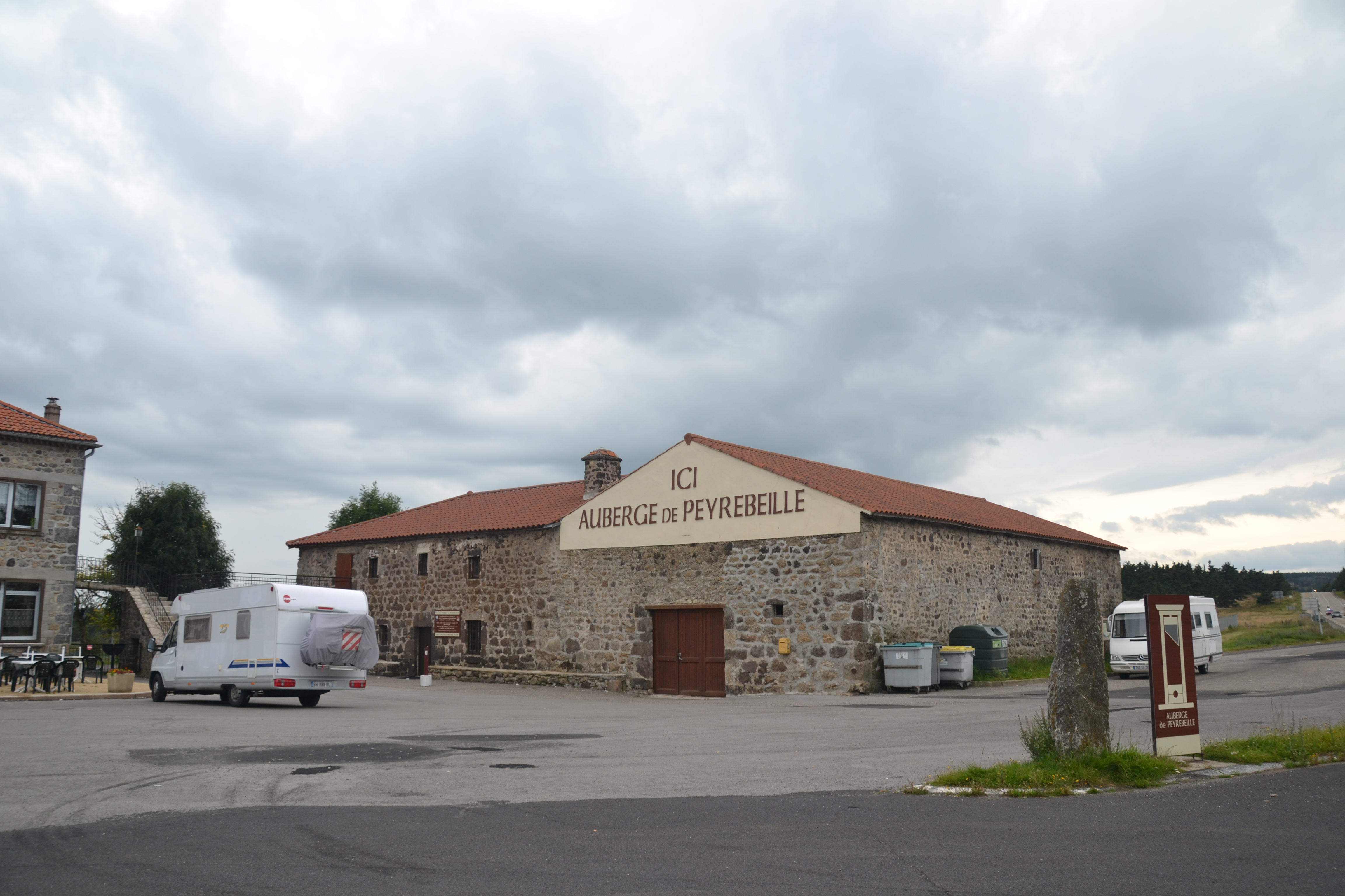 site de l'Auberge Rouge, sur la commune de Lanarce